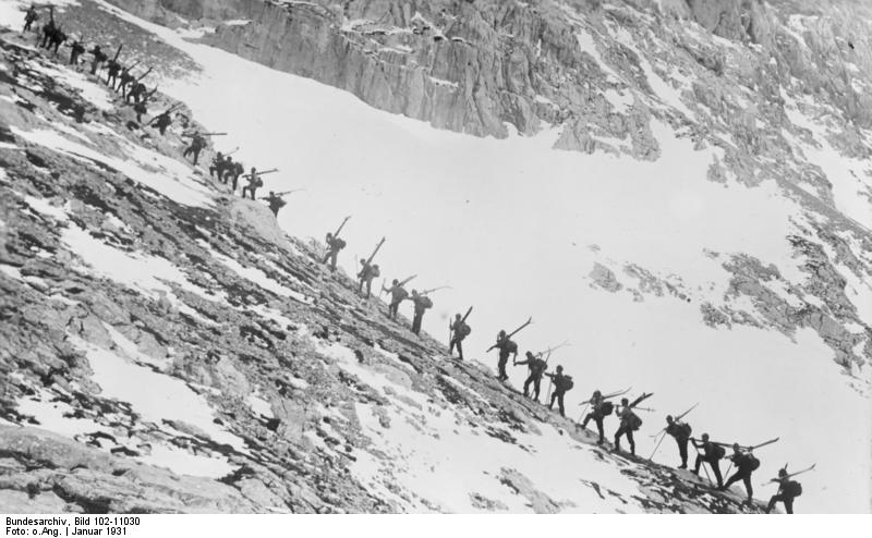 Öesterreichische Alpenjäger bei Uebungen im Dachsteingebiet! Eine Schneeschuhabteilung oesterreichischer Alpenjäger beim Vormarsch an den steilen Hängen der Feister-Charte im Dachsteingebiet zu Uebungszwecken.